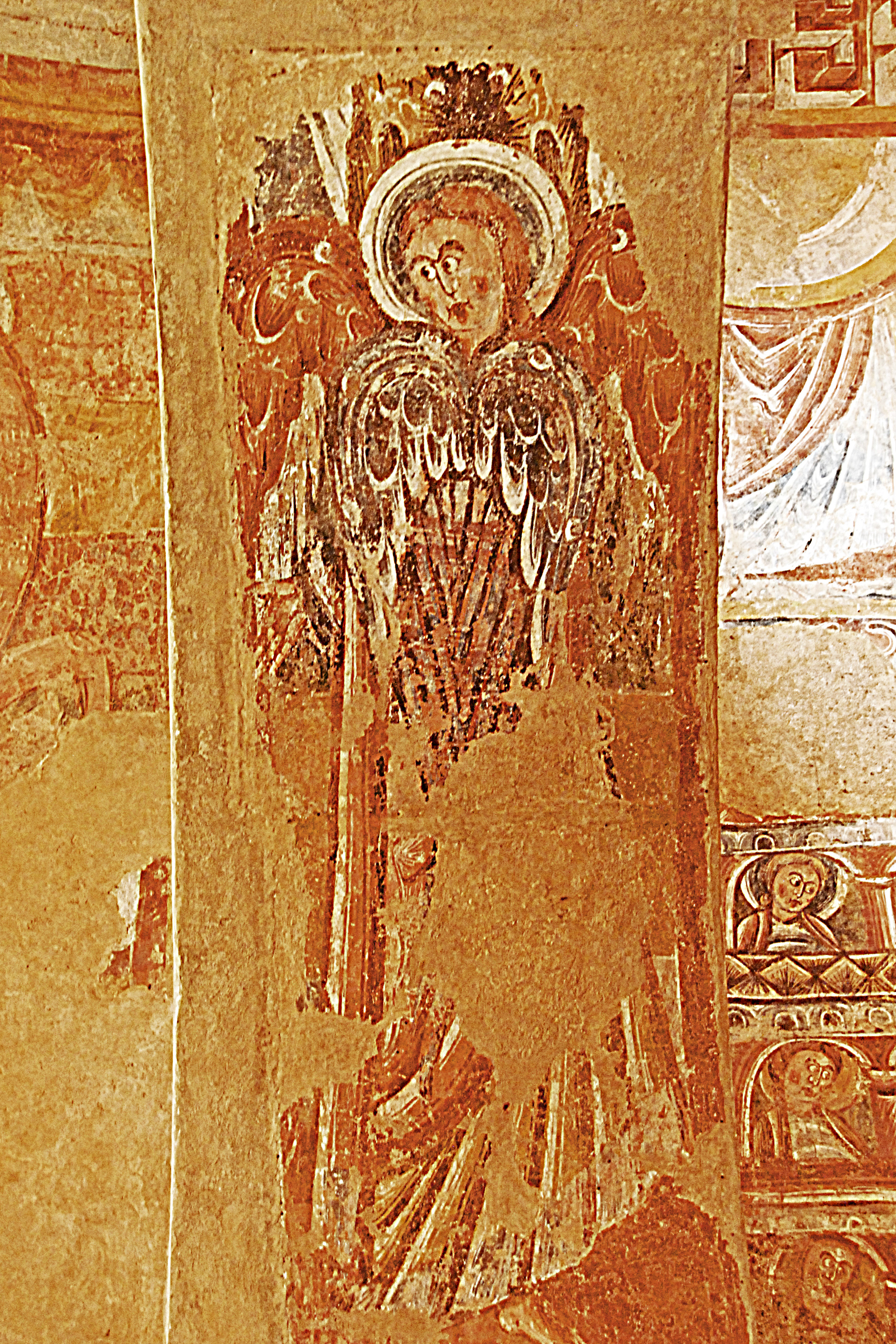 Laibung in Durchalss Südkapelle, Eraph